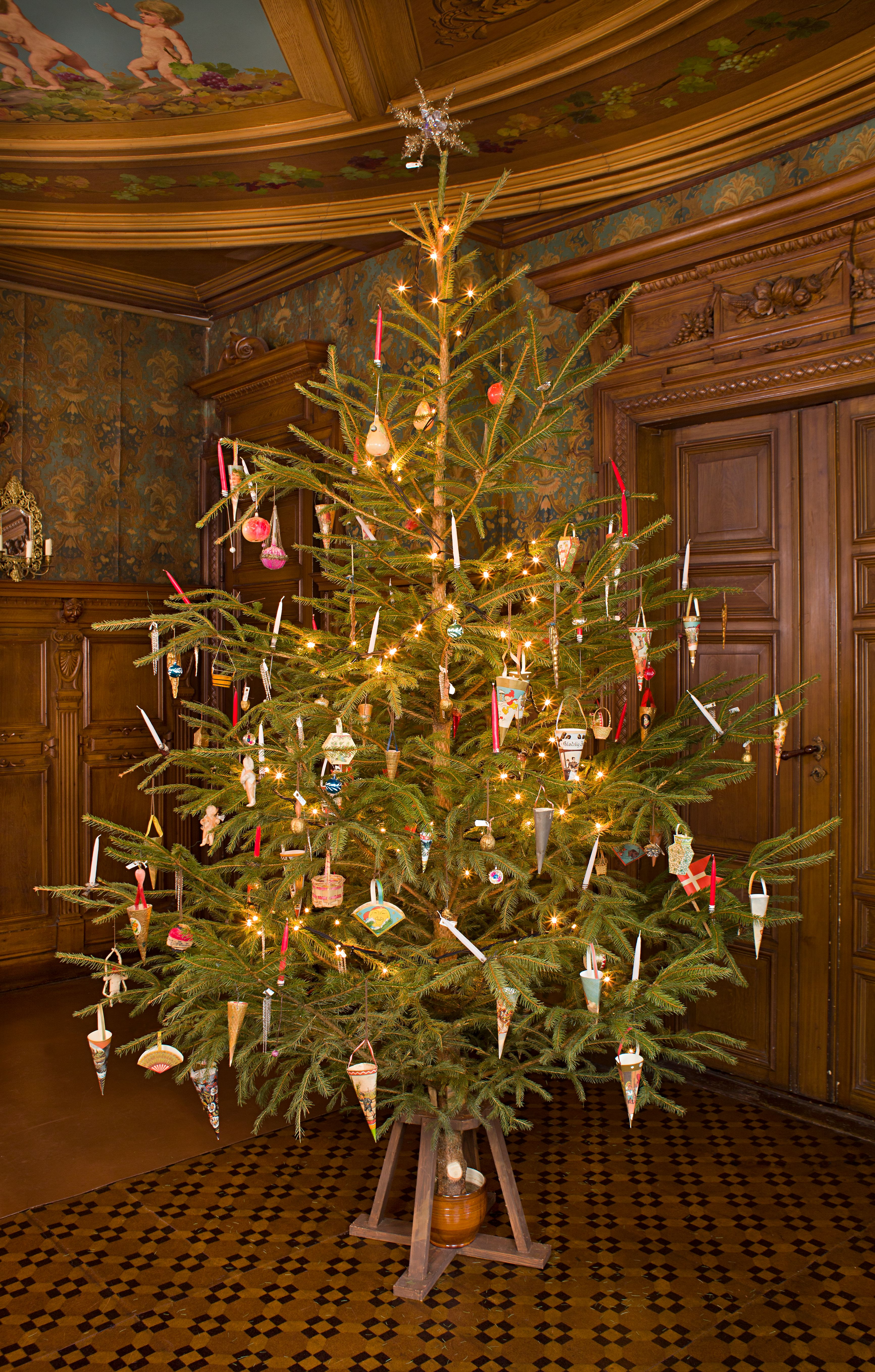 Pyntet juletræ i Nationalmuseets Klunkehjem, december 2010. Juletræet står i spisestuen. Træet er pyntet med julepynt fra begyndelsen af 1900-tallet, som dels har tilhørt familien Christensen, Klunkehjemmets ejere, og dels suppleret med julepynt fra Nationalmuseets samling. Træet er pyntet af museumsassistent Esther Grølsted.